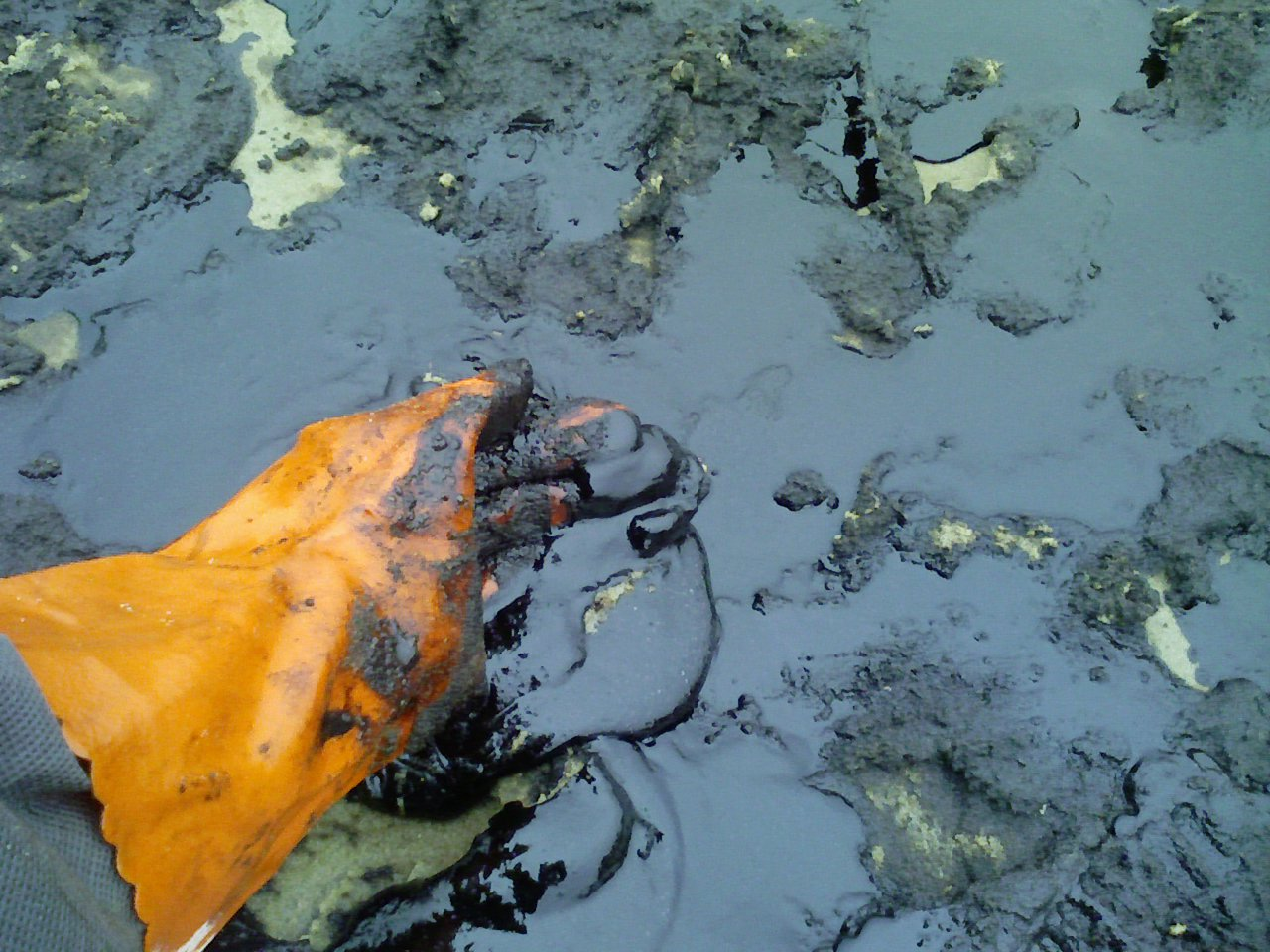 태안 원유 유출 사고 후 만리포 해수욕장. 개펄 위에 기름이 고여있다.